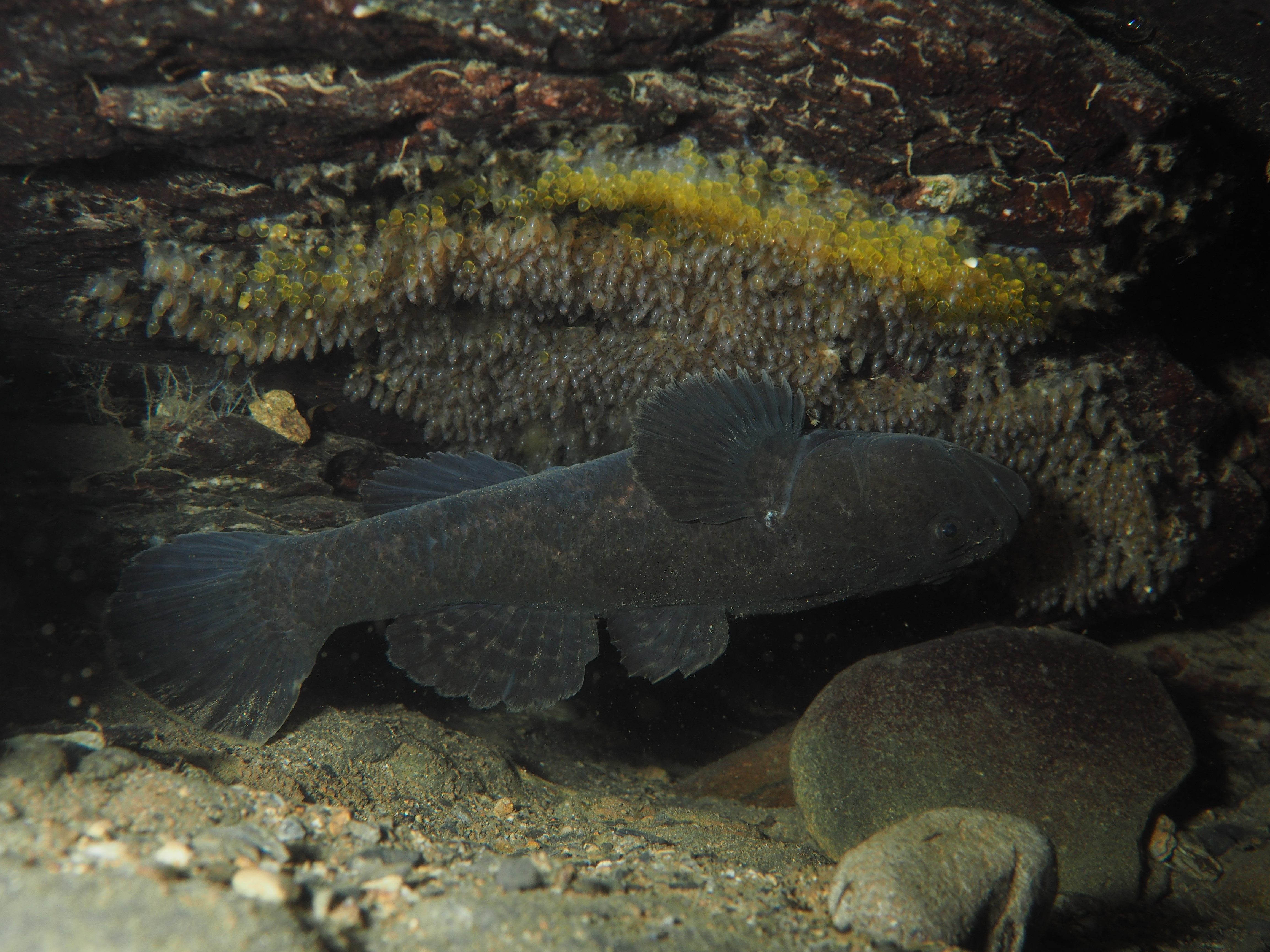 夏の夜、岩の下、巣と卵塊を守るドンコのオス（熊本県球磨川水系）。詳細